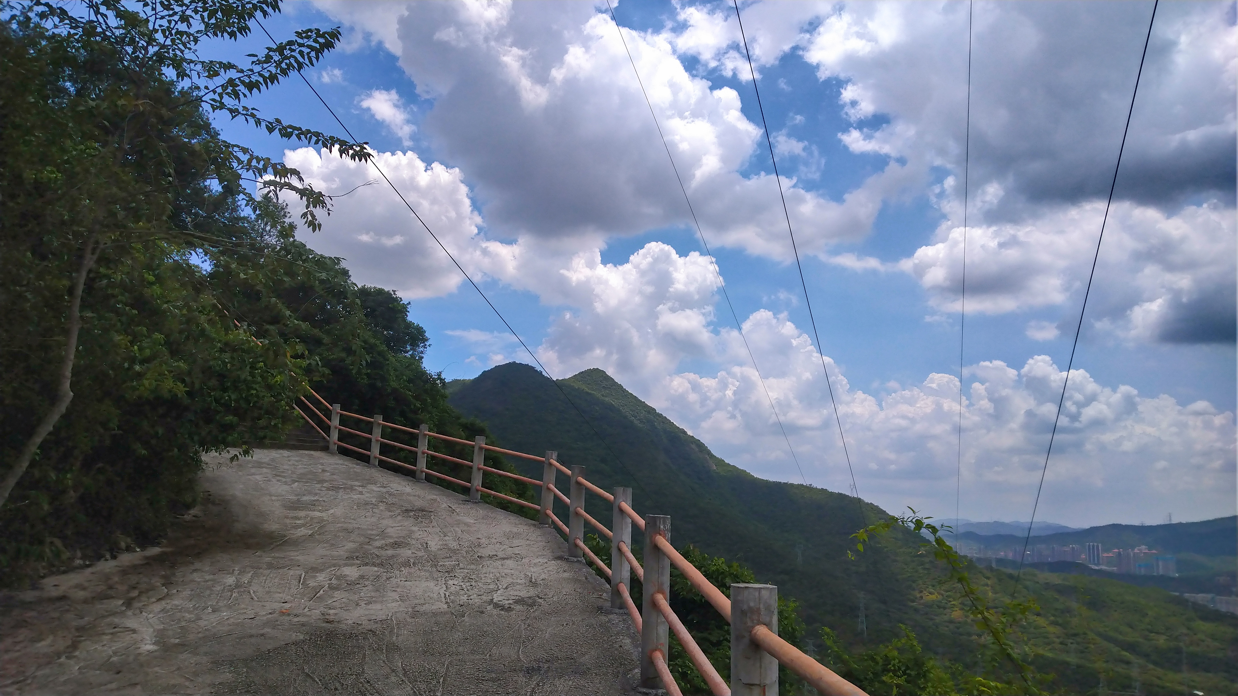 在观光山道头顶的高压电缆